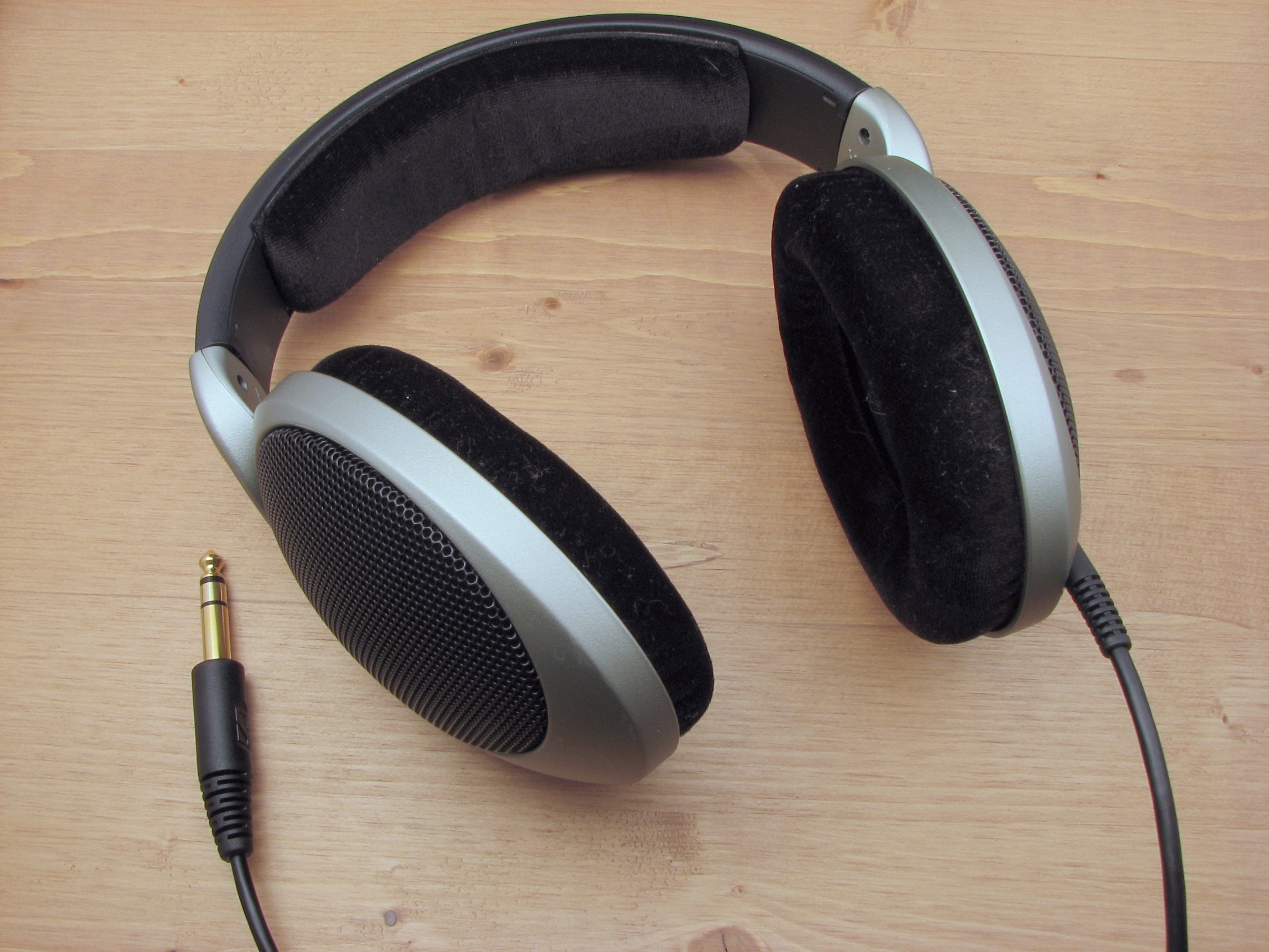 Sennheiser HD555 Headphones